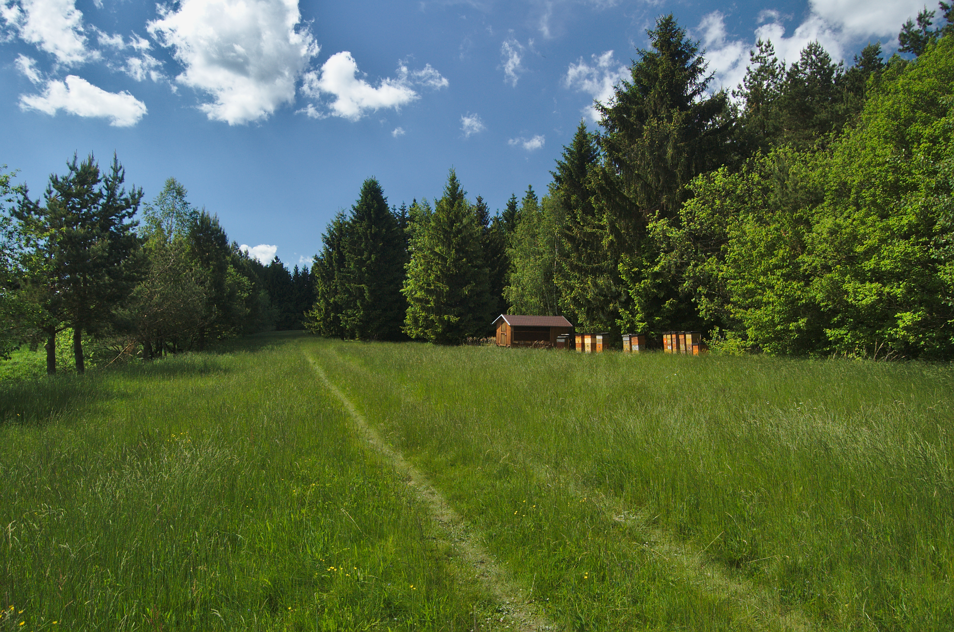 Přírodní památka Rašeliniště v Klozovci, Buková, okres Prostějov